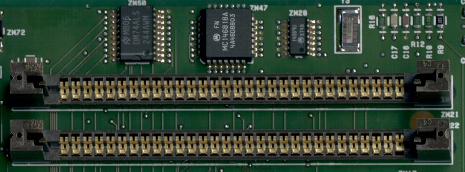 Eine SIMM-Bank bestehend aus 2 Slots auf einer "IBM PS/2 8550"-Hauptplatine